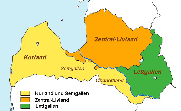 Karte der Historischen Regionen von Lettland. (Deutsche Version)